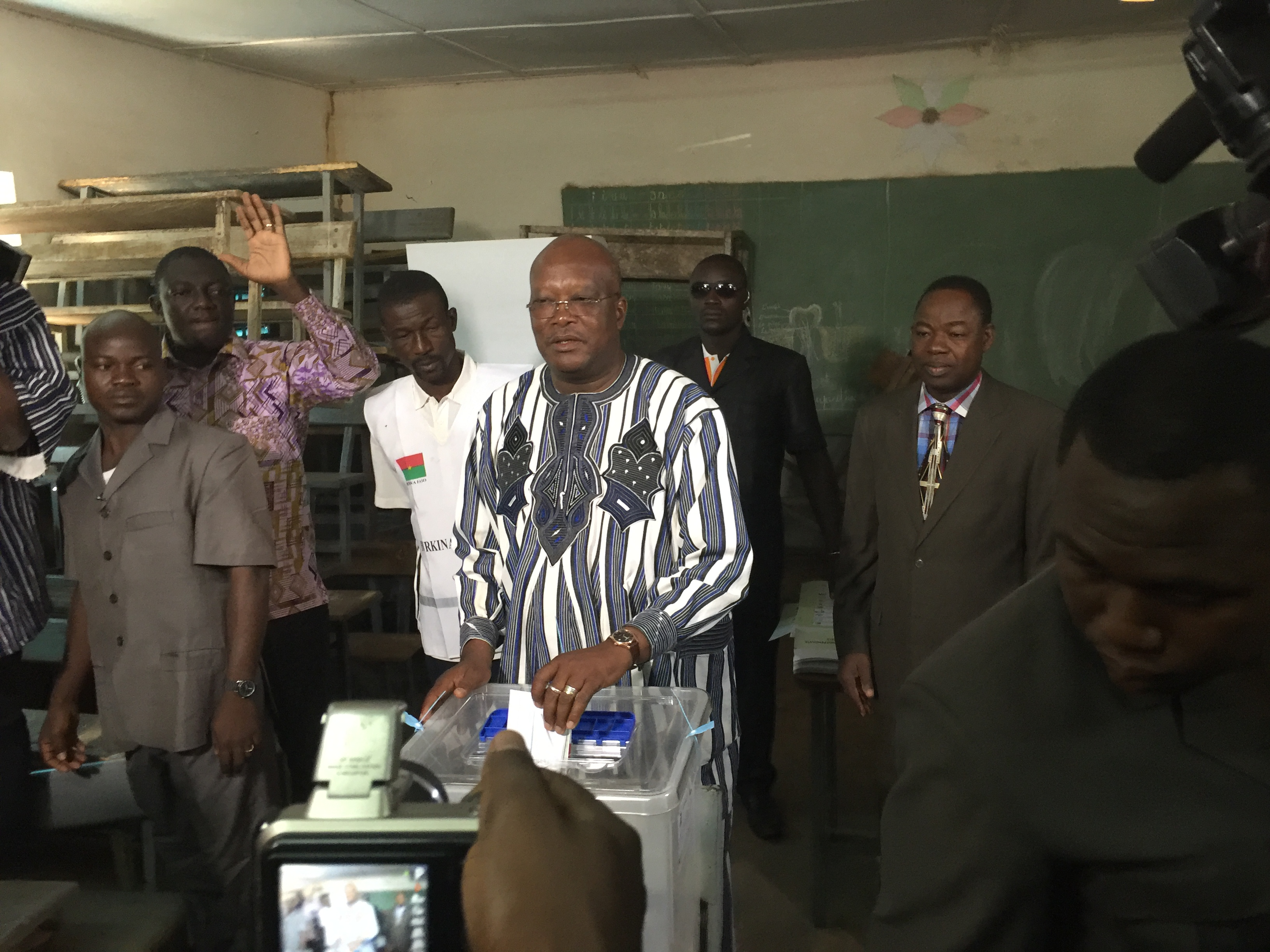 Roch Kaboré du MPP, sur le point de voter à Ouagadougou, dimanche 29 novembre 2015. Il a été élu président du Burkina selon les derniers résultats